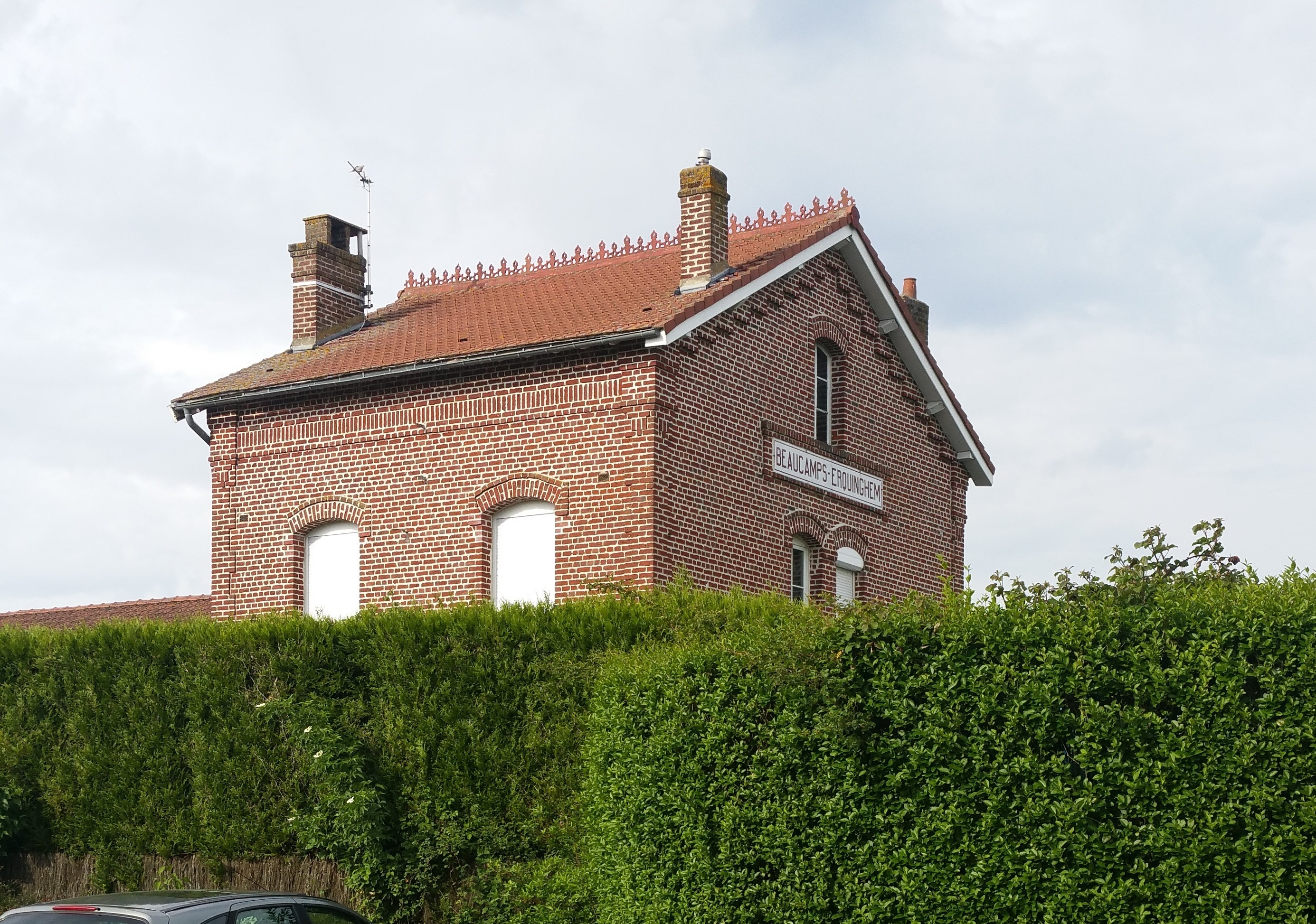 Vue de l'ancienne gare de Beaucamps-Erquinghem.